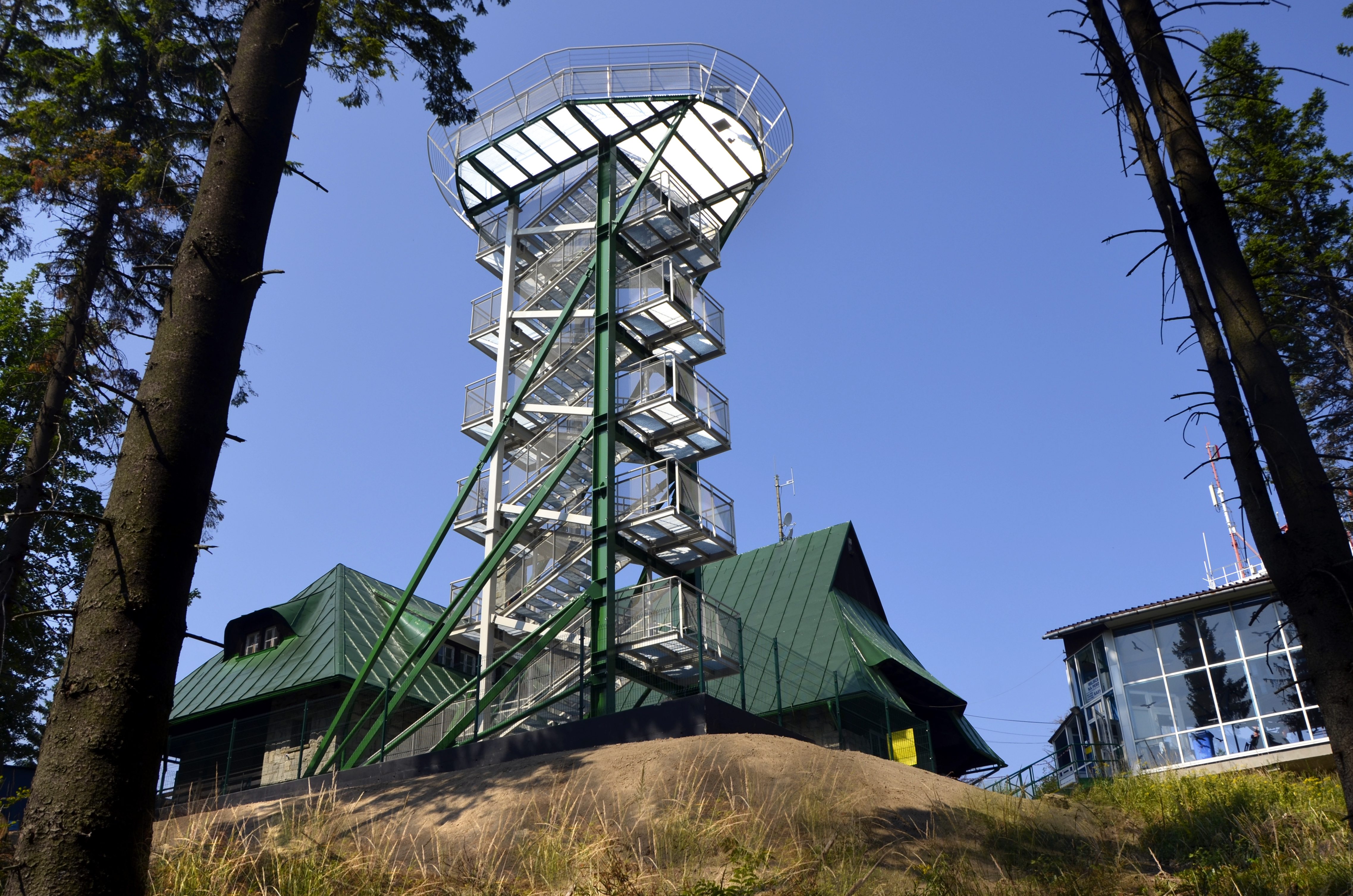 Wieża widokowa przy górnej stacji Kolei Linowej Szyndzielnia. Właściciel wieży KLSz